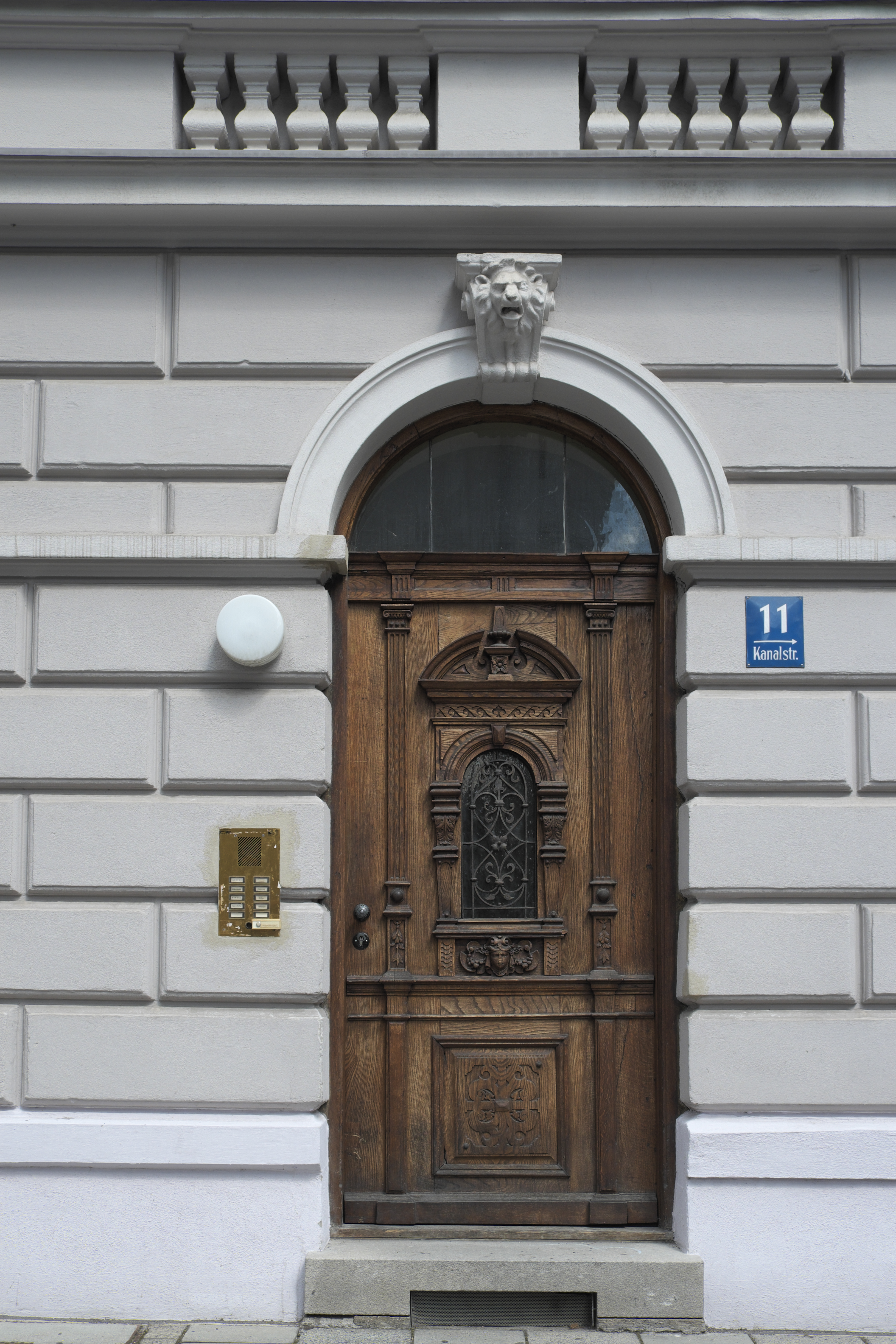 Mietshaus in der Kanalstraße 11 im Lehel im Stadtbezirk Altstadt-Lehel in München (Bayern/Deutschland), 1887/88 von Gottfried Hohenleitner gebaut, Haustür